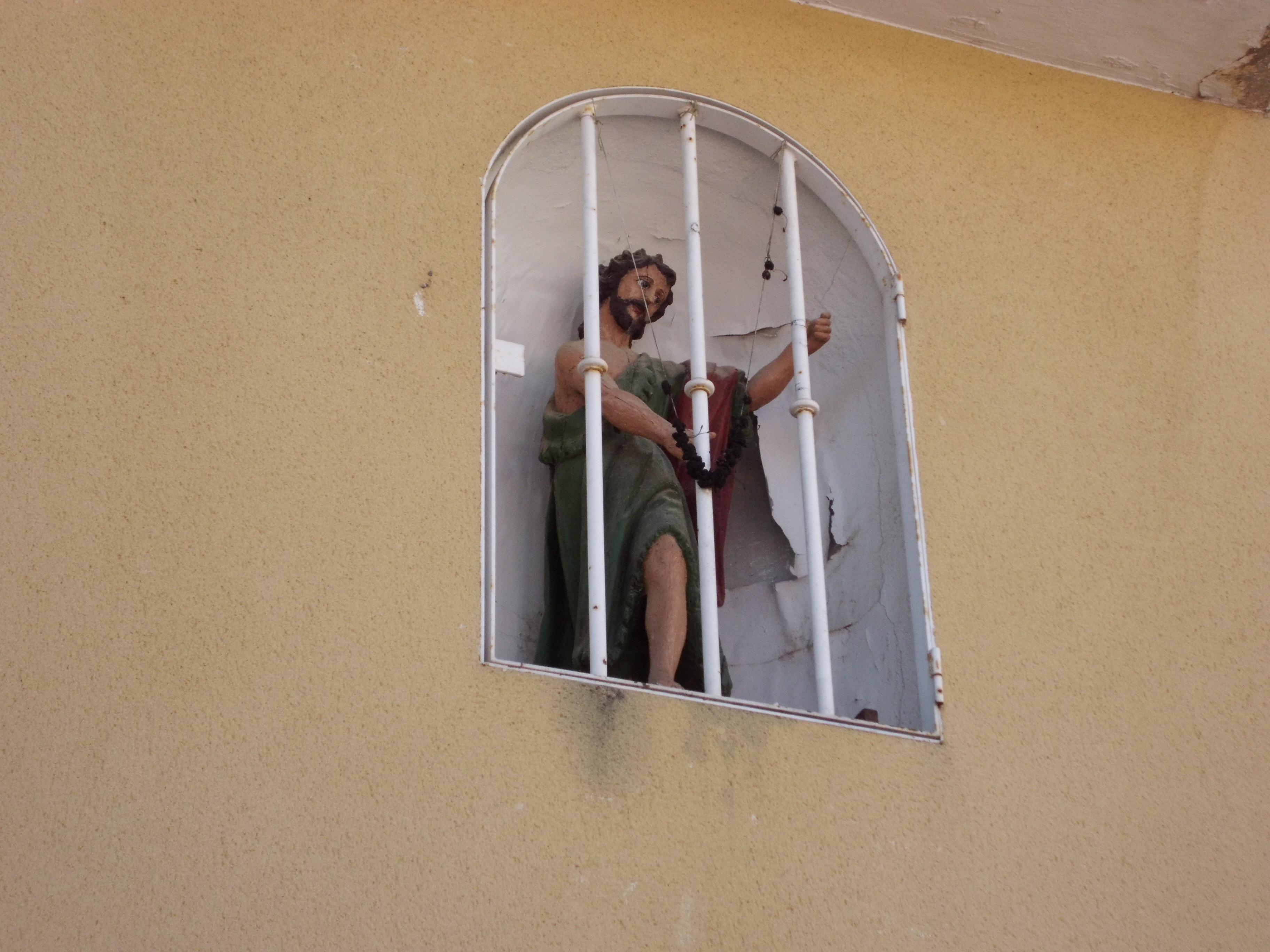 Hospital de San Juan Evangelista, establecimiento de caridad para enfermos necesitados y sin recursos puesto en marcha a mediados del siglo XVI y ubicado en la plaza Mayor de Cigales (Valladolid, España). Hornacina con una imagen de San Juan Bautista en madera policromada que perteneció a otro hospital que hubo dedicado a este santo.